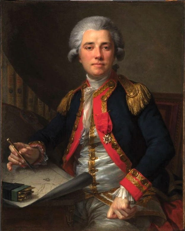 Portrait de 1778 du comte Jean-François de Galaup de La Pérouse (1741-1788), marin et explorateur français. Portait réalisé au retour des Indes : tenue de lieutenant de vaisseau avec port de l'ordre de Saint-Louis délivré l'année précédente. Localisation : Fine Arts Museums of San Francisco.